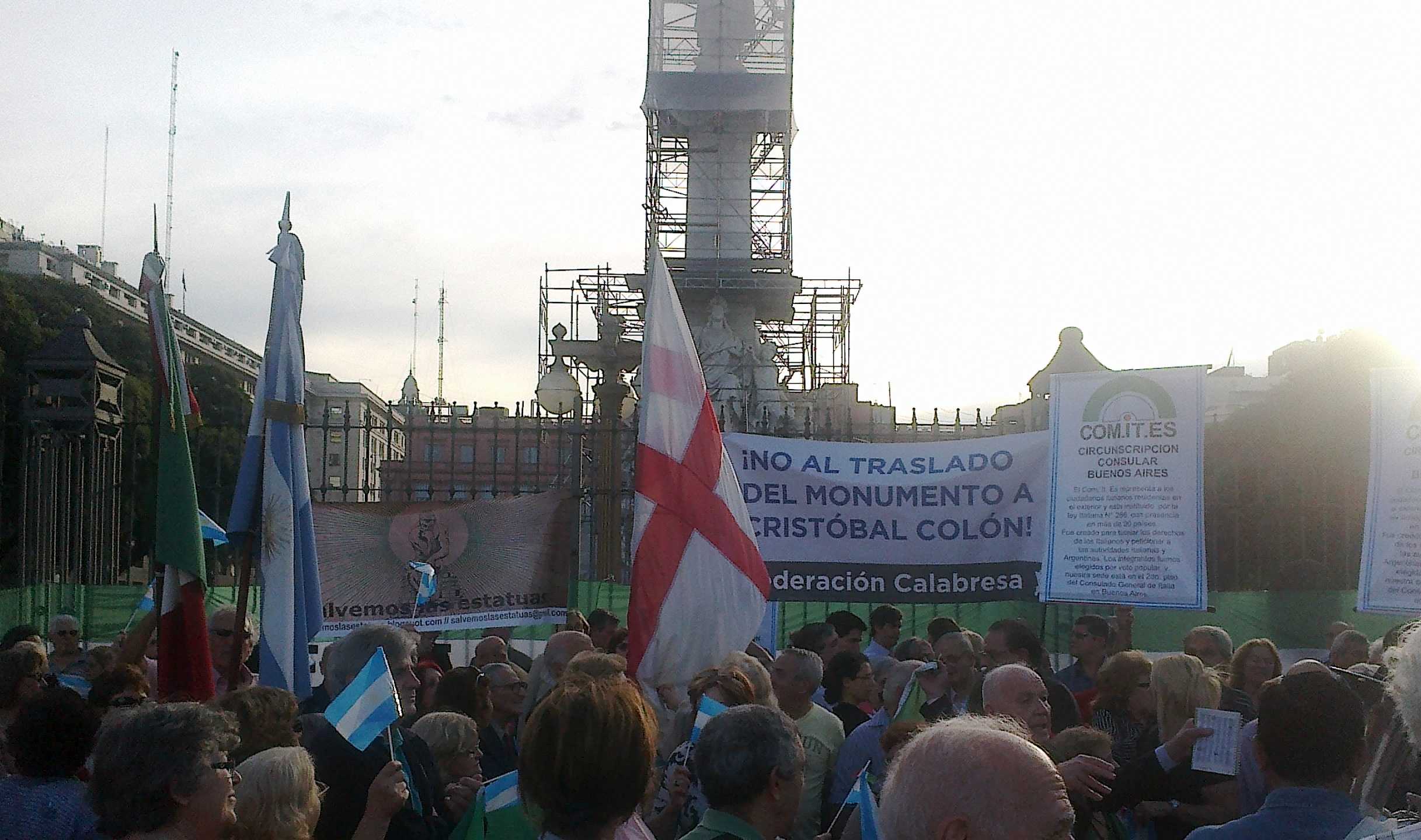 Protesta de la comunidad italiana de Buenos Aires y de ONGs defensoras del patrimonio histórico ante el eminente traslado del monumento a Colón, en el parque Colón, Buenos Aires, Argentina